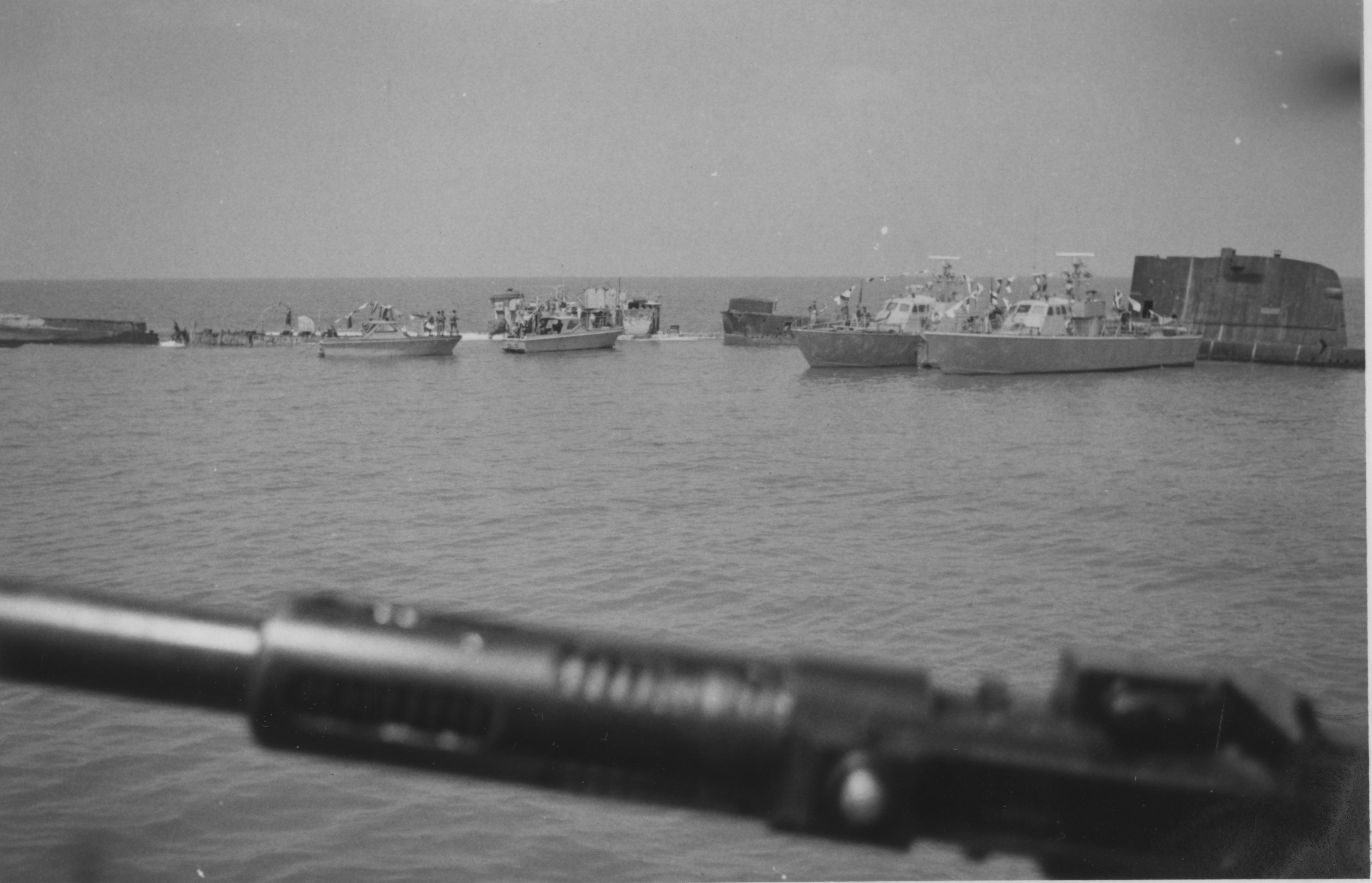 נמל דפנה בתפושה מלאה שני דבורים ושלושה יתושים בחוף הים